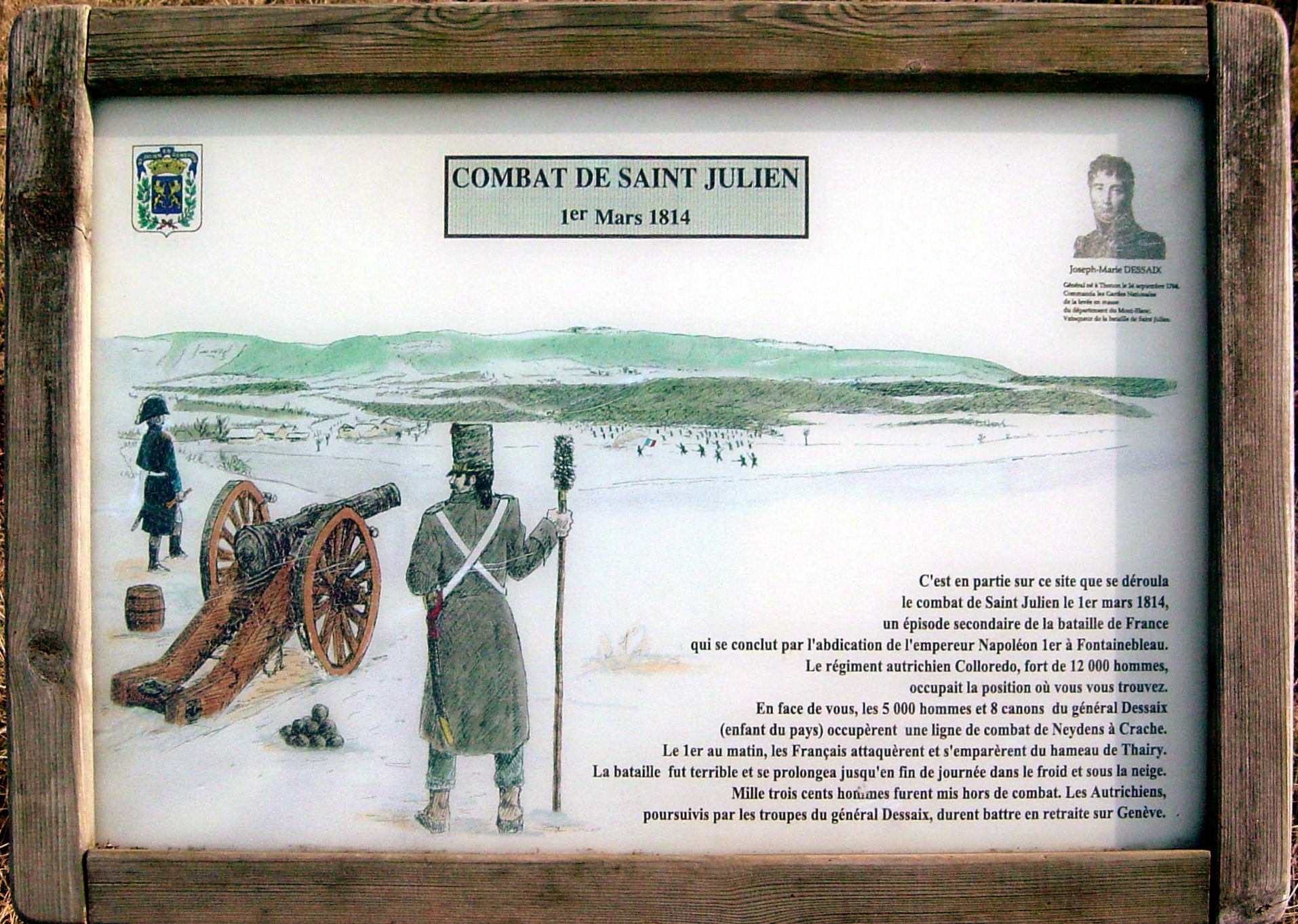 Panneau entre Thairy et Crâche, sur les hauteurs, décrivant les combats qui ont lieu au 18ème ciècle. Crâche est un hameau appartenant à Saint-Julien-en-Genevois en Haute-Savoie, France.